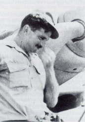 (סיד כהן כמפקד טייסת הקרב הראשונה (101